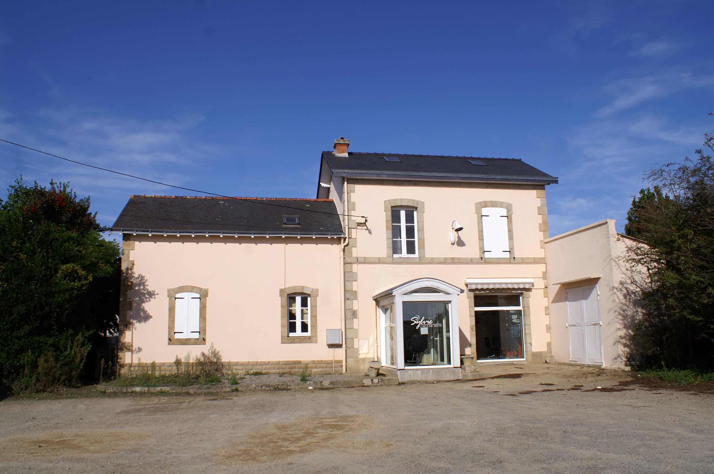 Façade extérieure de l'ancien bâtiment voyageur de la gare de Belz - Ploemel sur la commune de Ploemel. En 2009 un coiffeur est installé dans le bâtiment qui appartient toujours à la SNCF. La gare est ouverte pendant l'été, mais l'accès sur l'unique quai se fait par un portillon à côté du passage à niveau.